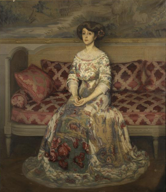 La robe à ramages. Mme Edmond Rostand, née Rosemonde Gérard (1866-1953)